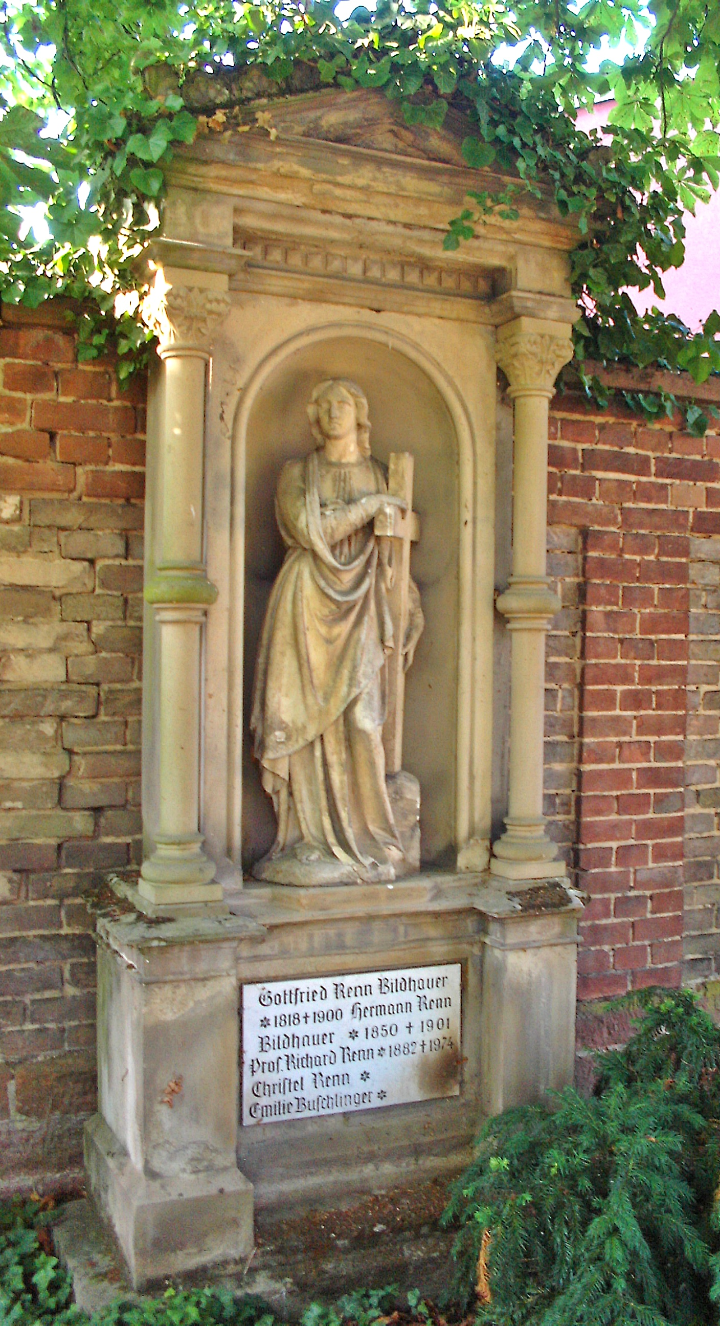 Grabmal des Bildhauers Gottfried Renn (1818-1880), Friedhof Speyer, nördliche Mauer